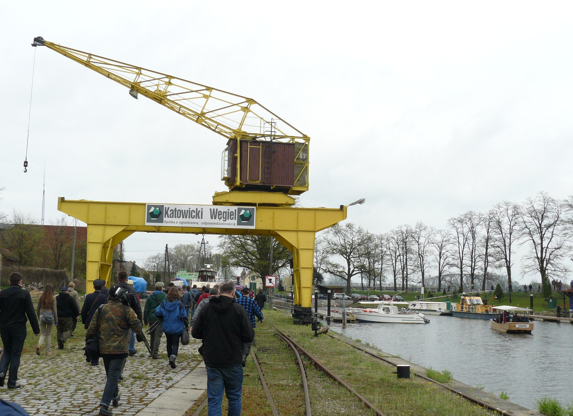 Cigacice - port na Odrze.